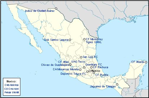 Répartition des clubs au Mexique en 2009-2010.